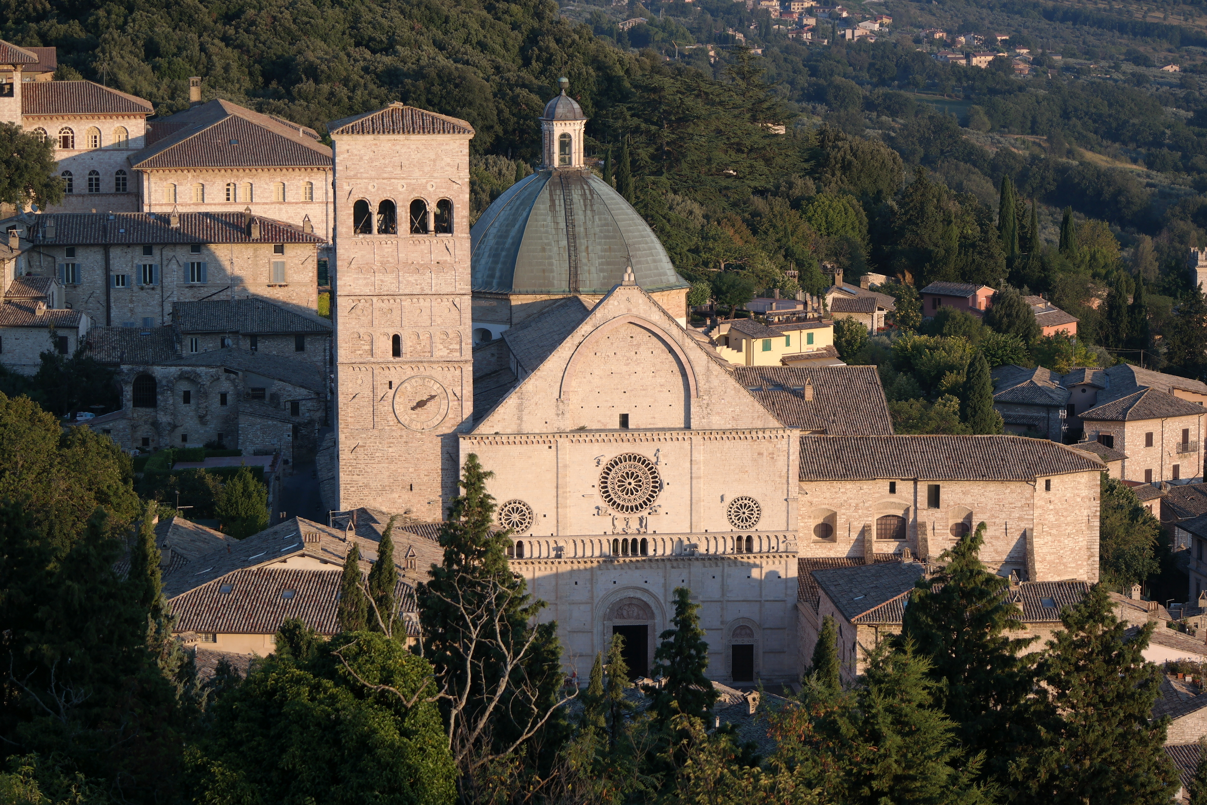 Cattedrale di San Rufino vista dalla Rocca maggiore ad Assisi